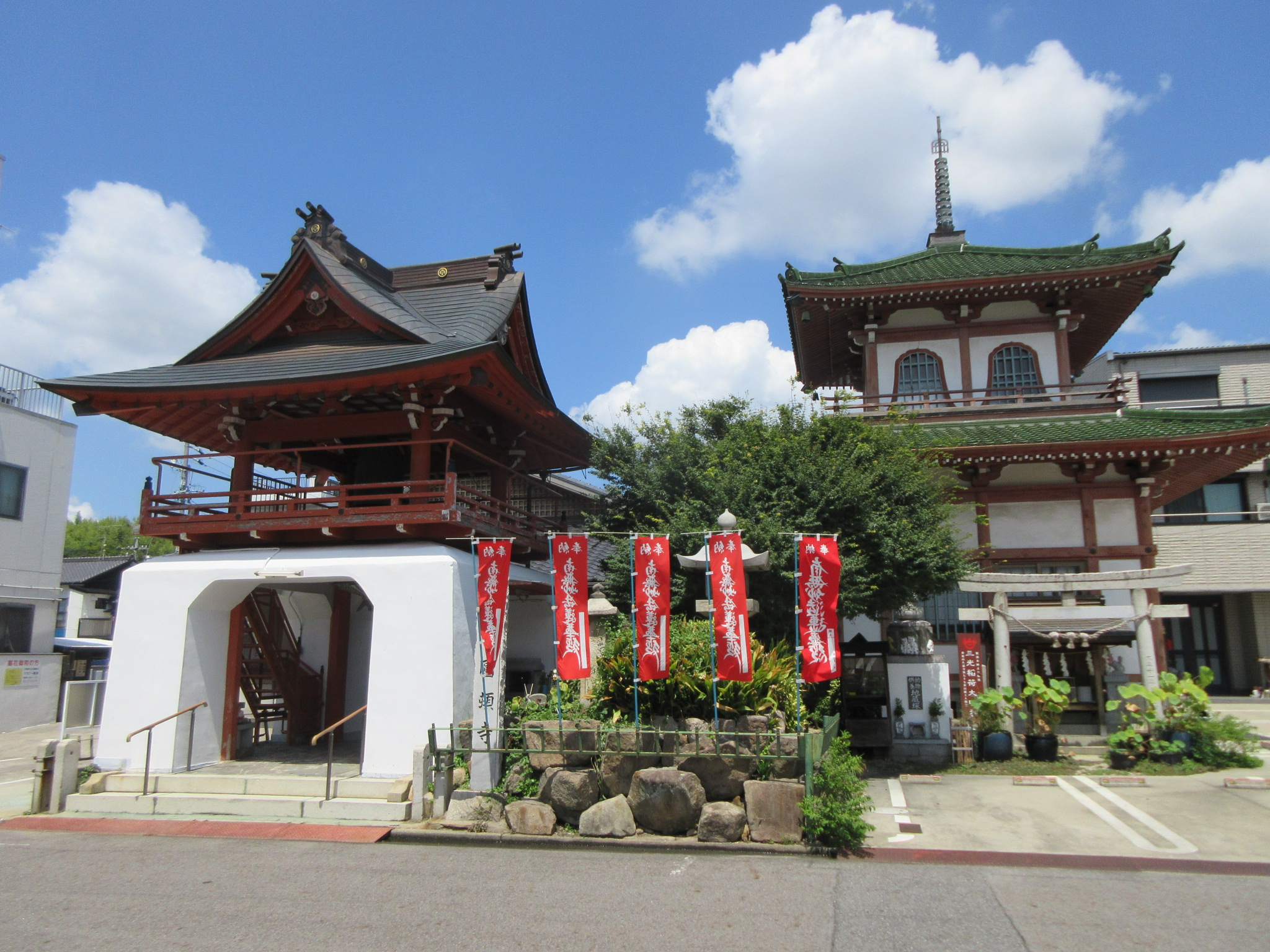 円頓寺（岡崎市久右ヱ門町）